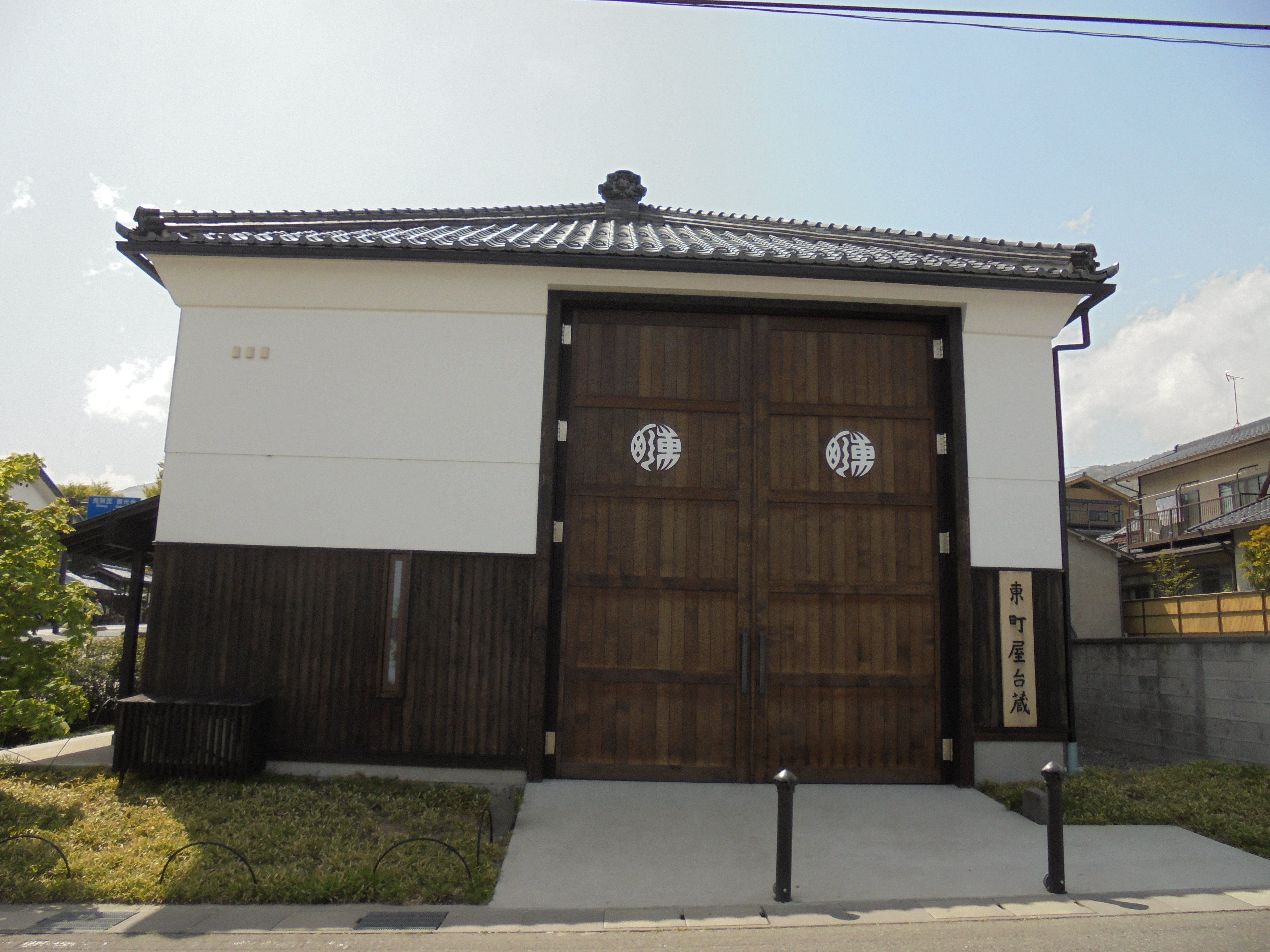 東町屋台蔵（長野県長野市東町）